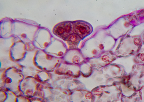 Wachsdrüsenzellen von der Blattoberseite Helleborus niger, Durchlicht, 100 fach, gefärbt.